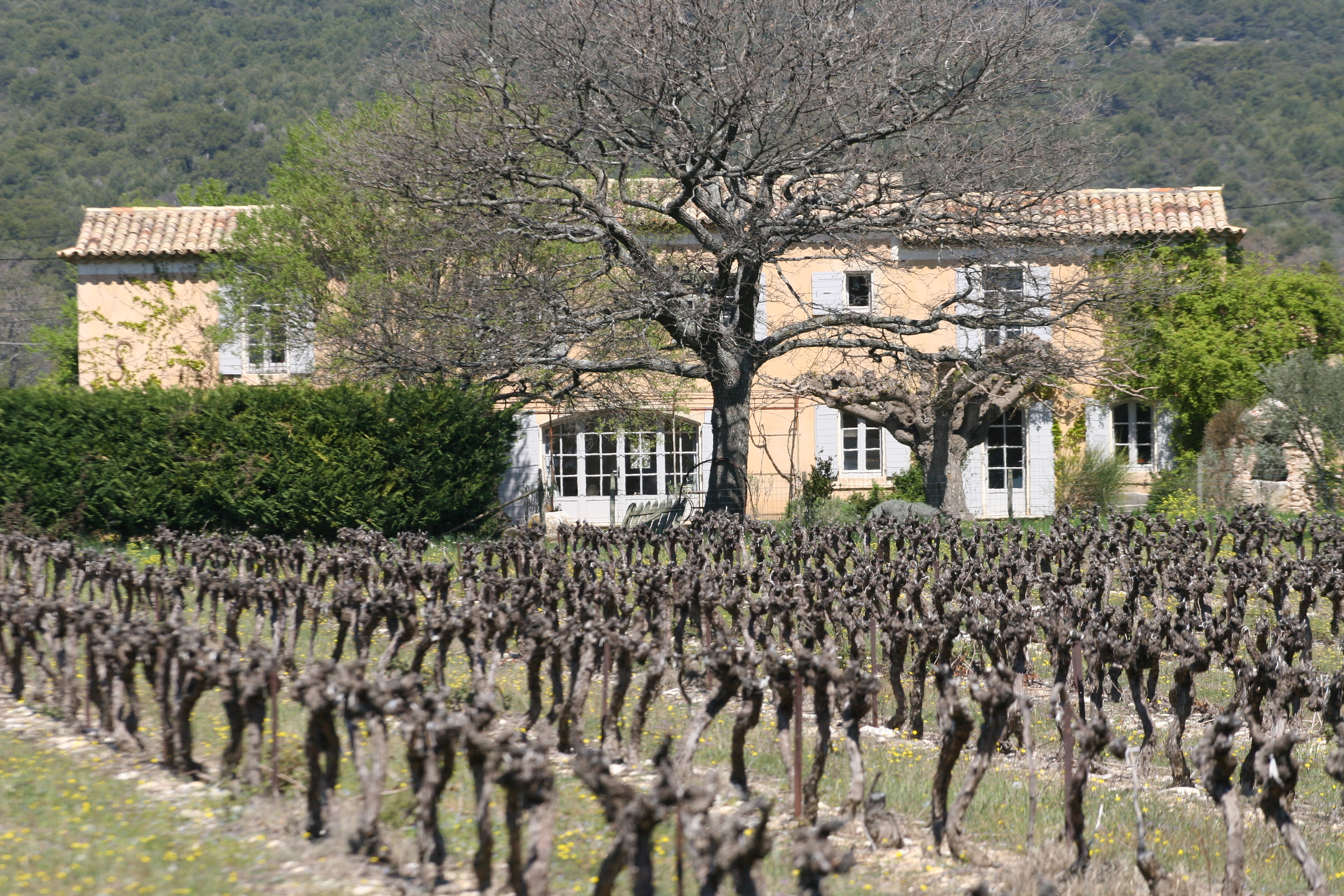 Mas du Luberon